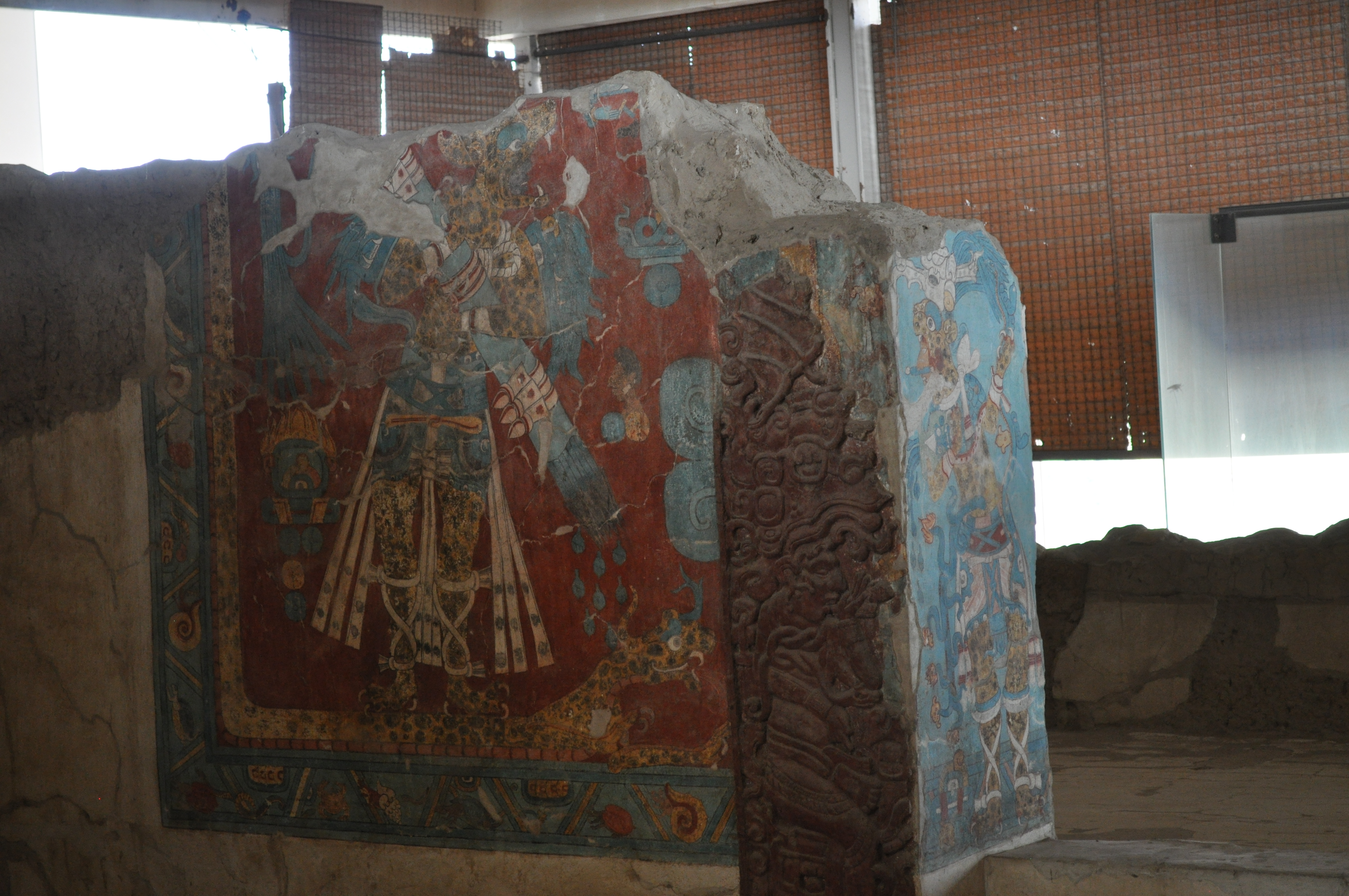 Cacaxtla